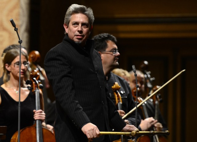 Sonaozour Elliot Goldenthal e Praha, 24 a wiz Gwengolo 2014